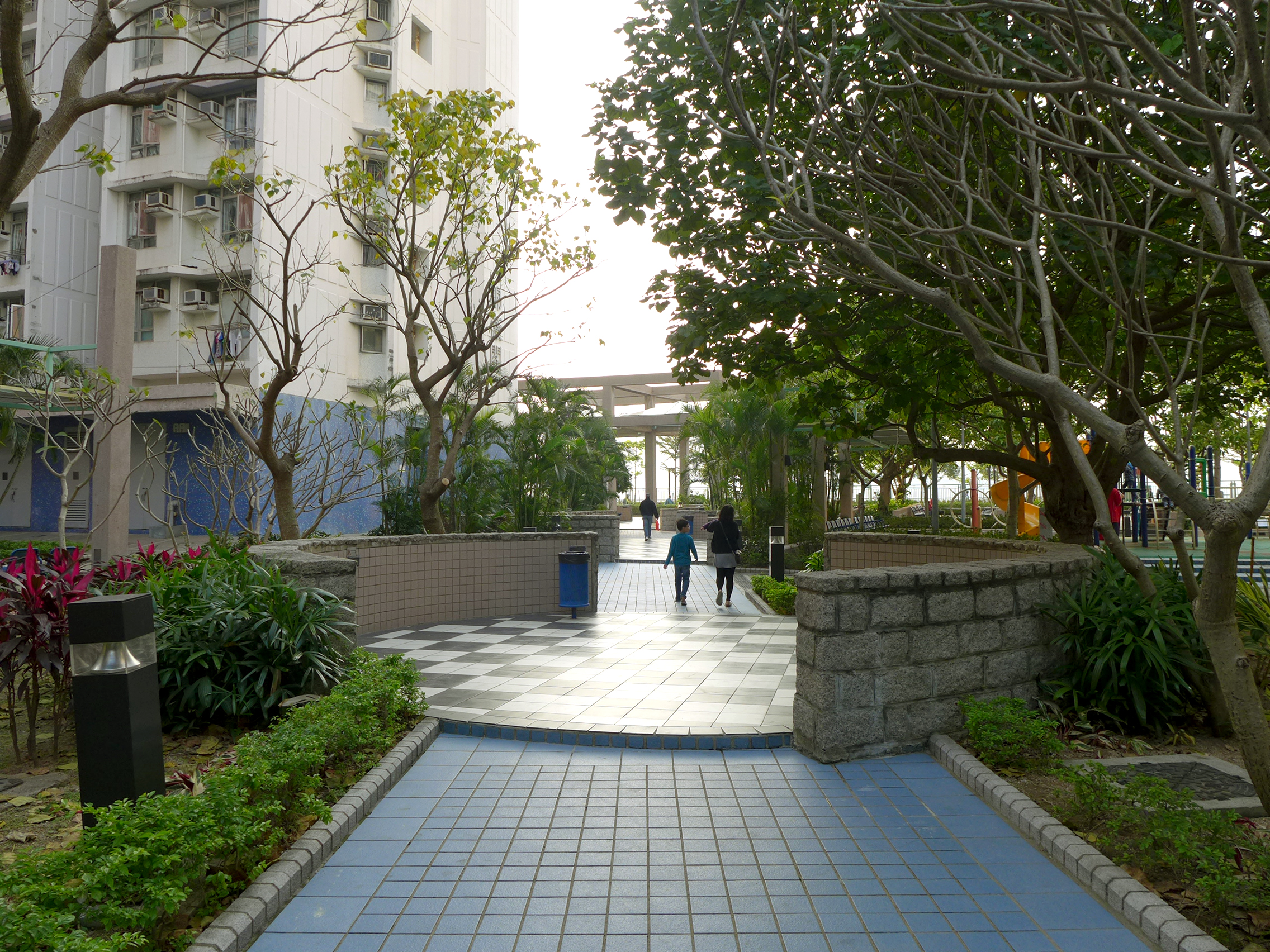 Kam Fung Court Landscape Garden